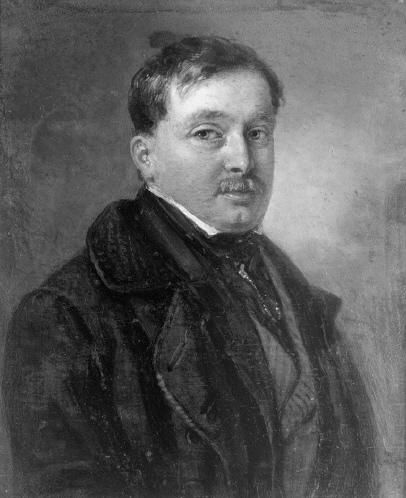 Self-portrait